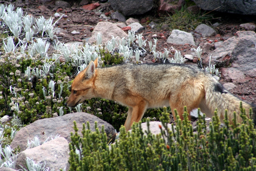 Andenfuchs, beobachtet in Ecuador im Nationalpark Cotopaxi in ca. 5.000 Metern Höhe